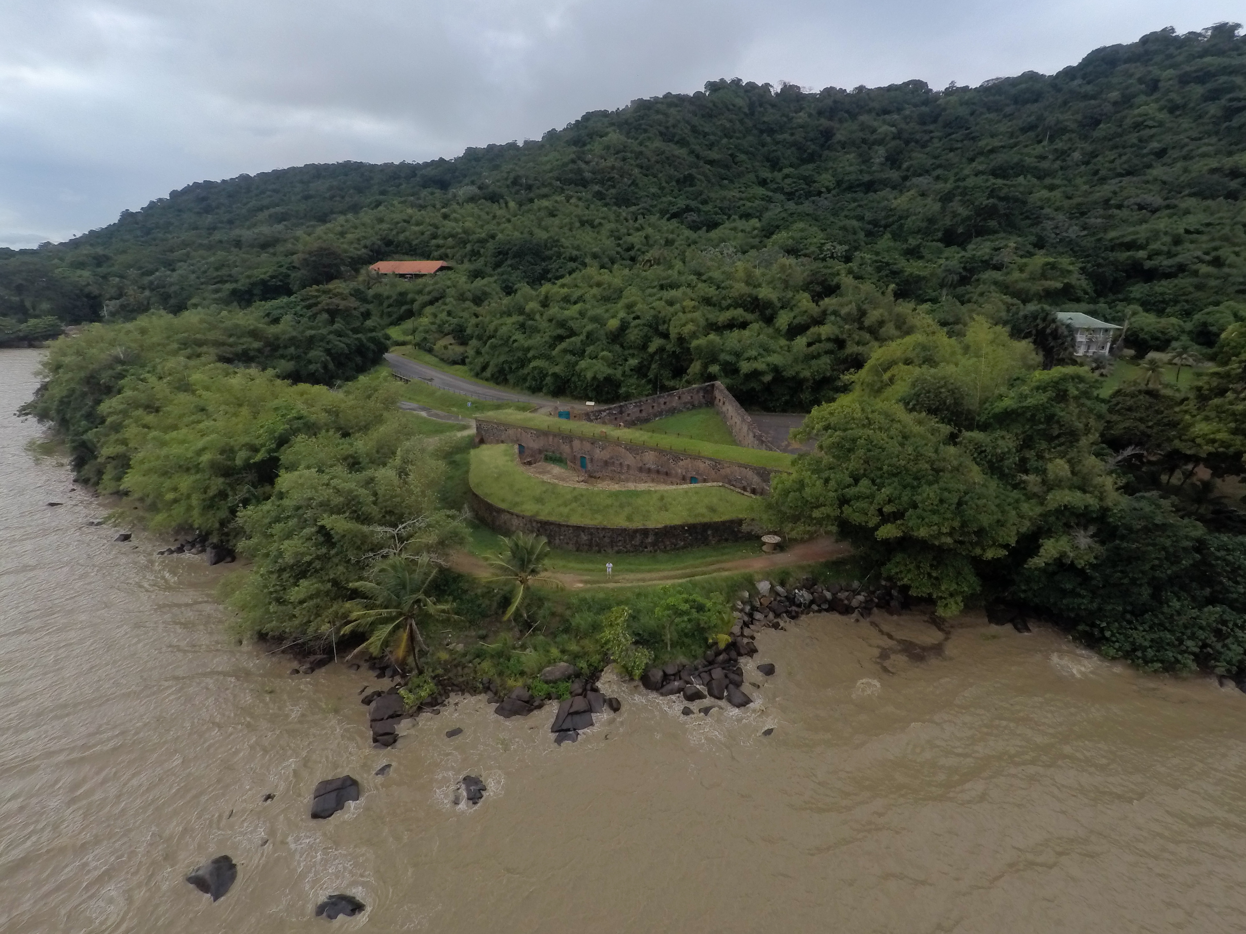 Vue aérienne du fort Diamant situé à Rémire-Montjoly en Guyane.